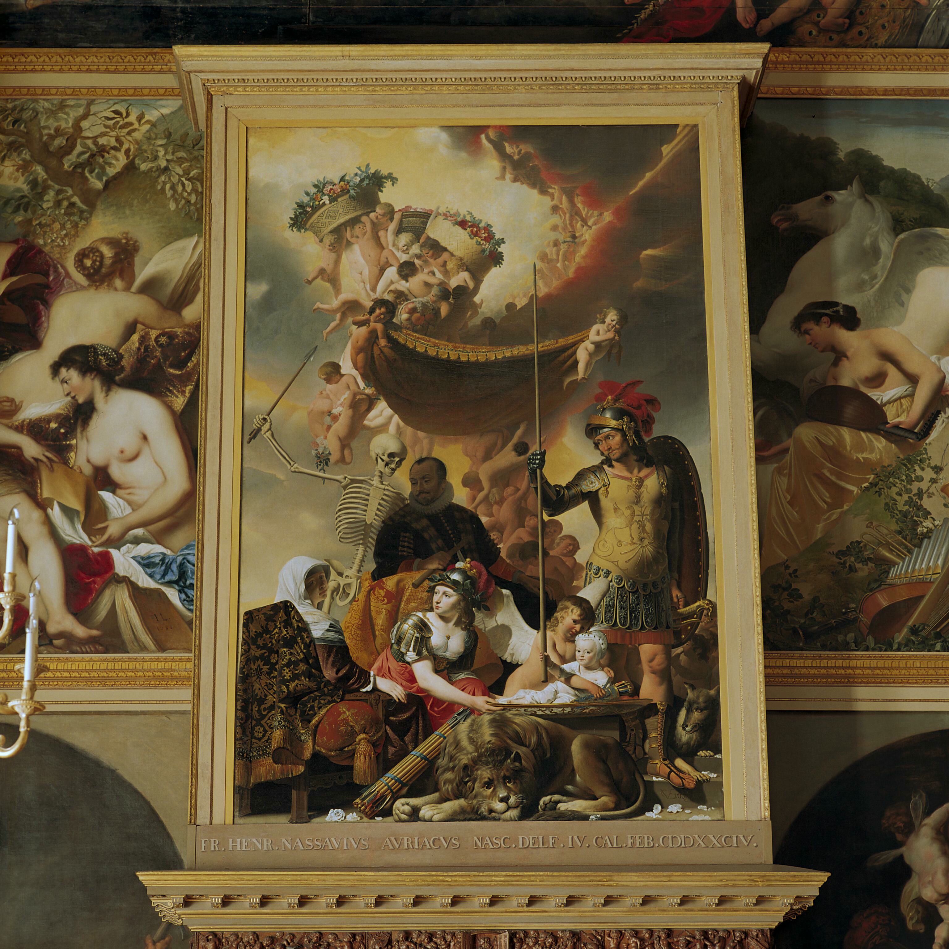 Huis ten Bosch: Oranjezaal na de restauratie: schilderij boven de ingang westzijde